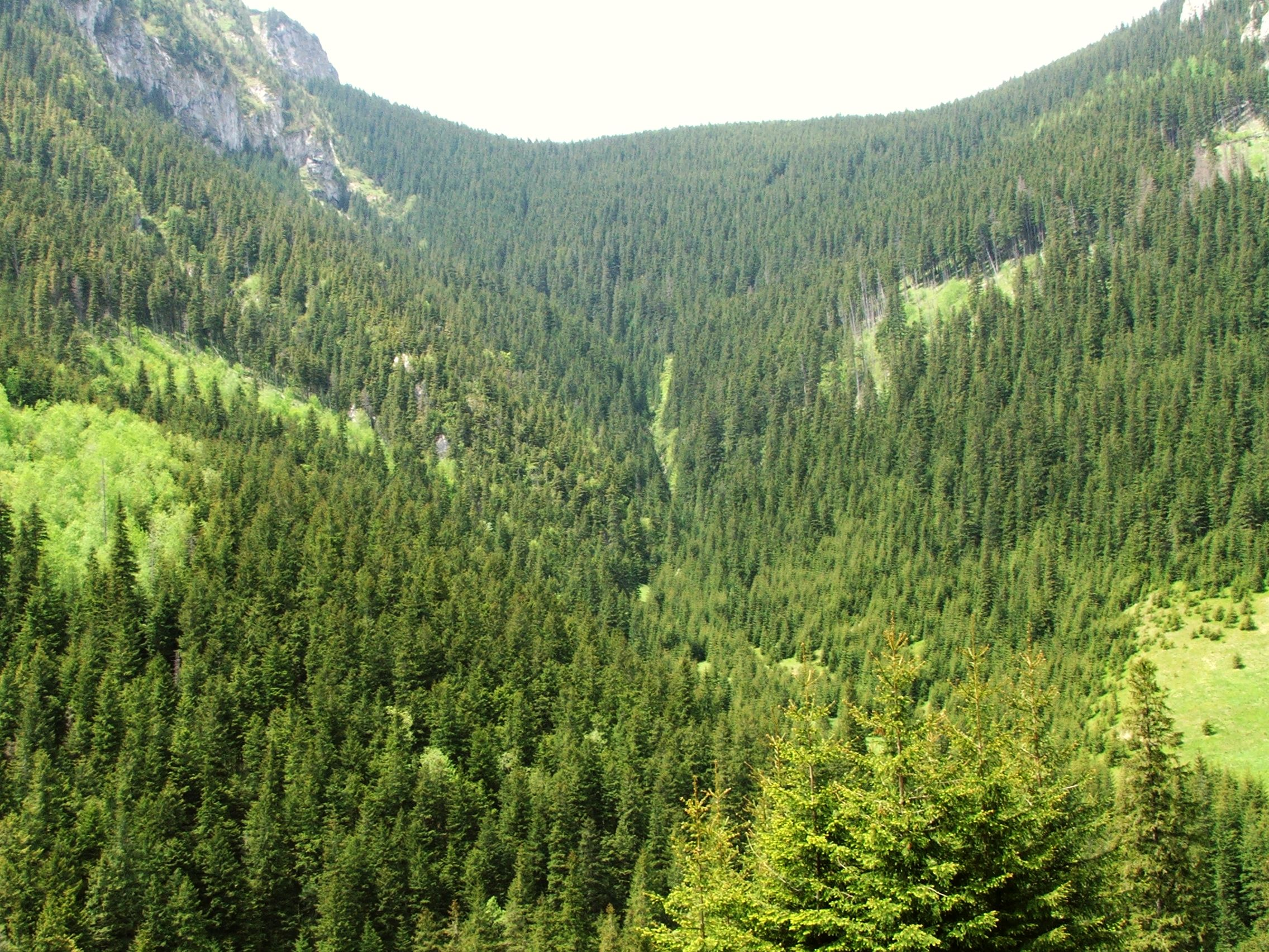 Żleb Żeleźniak na Hali Pisanej (Dolina Kościeliska)